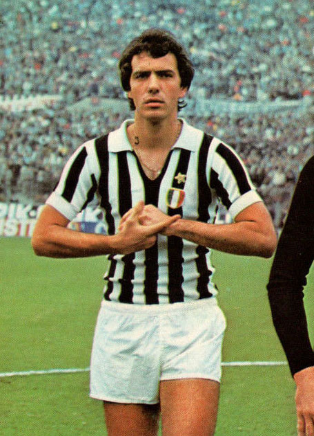 Il calciatore italiano Roberto Bettega alla Juventus nella stagione 1973-74, prima dell'inizio di una partita allo stadio Comunale di Torino.